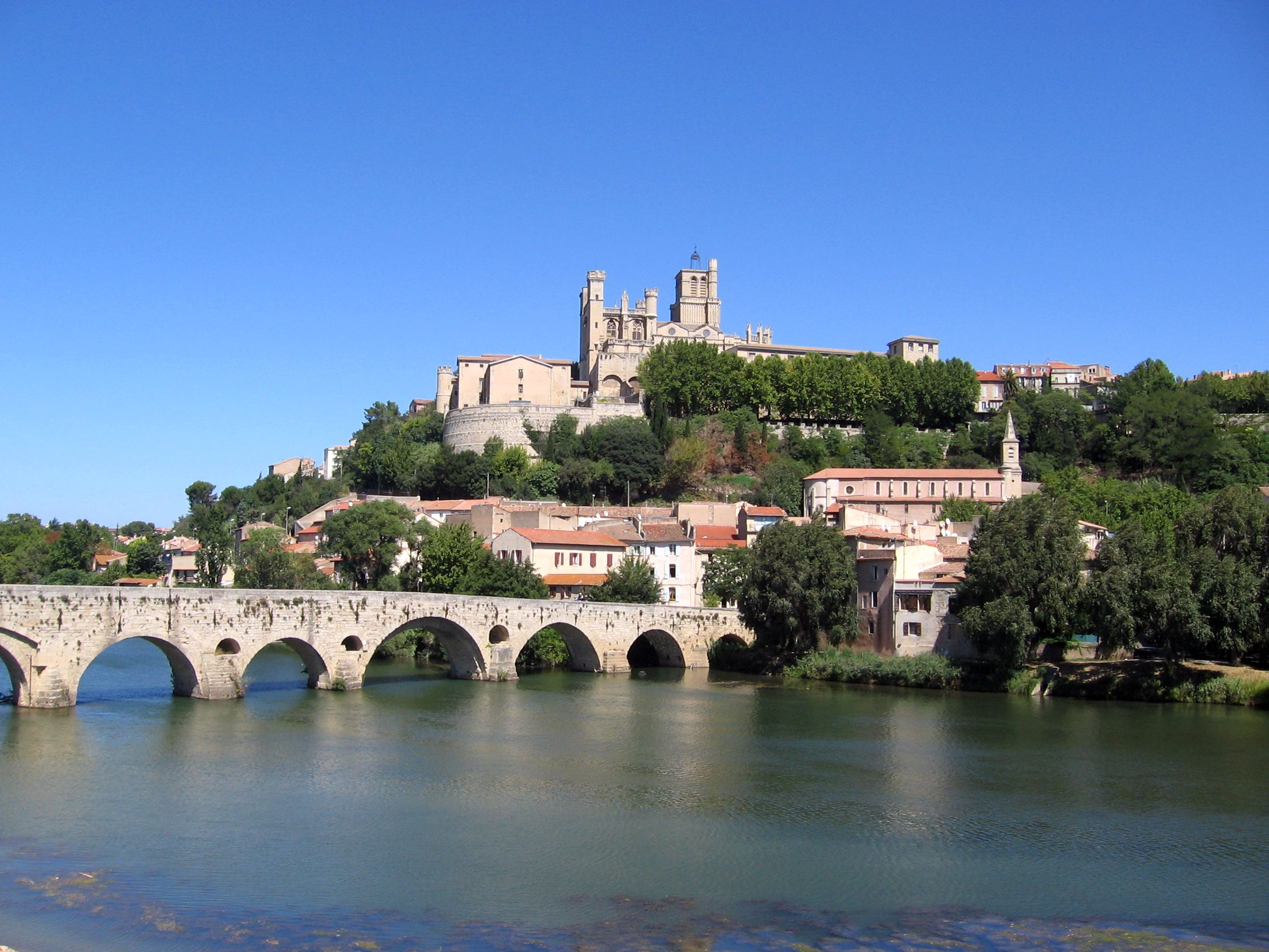 Kathedrale und Pont Vieux in Béziers.